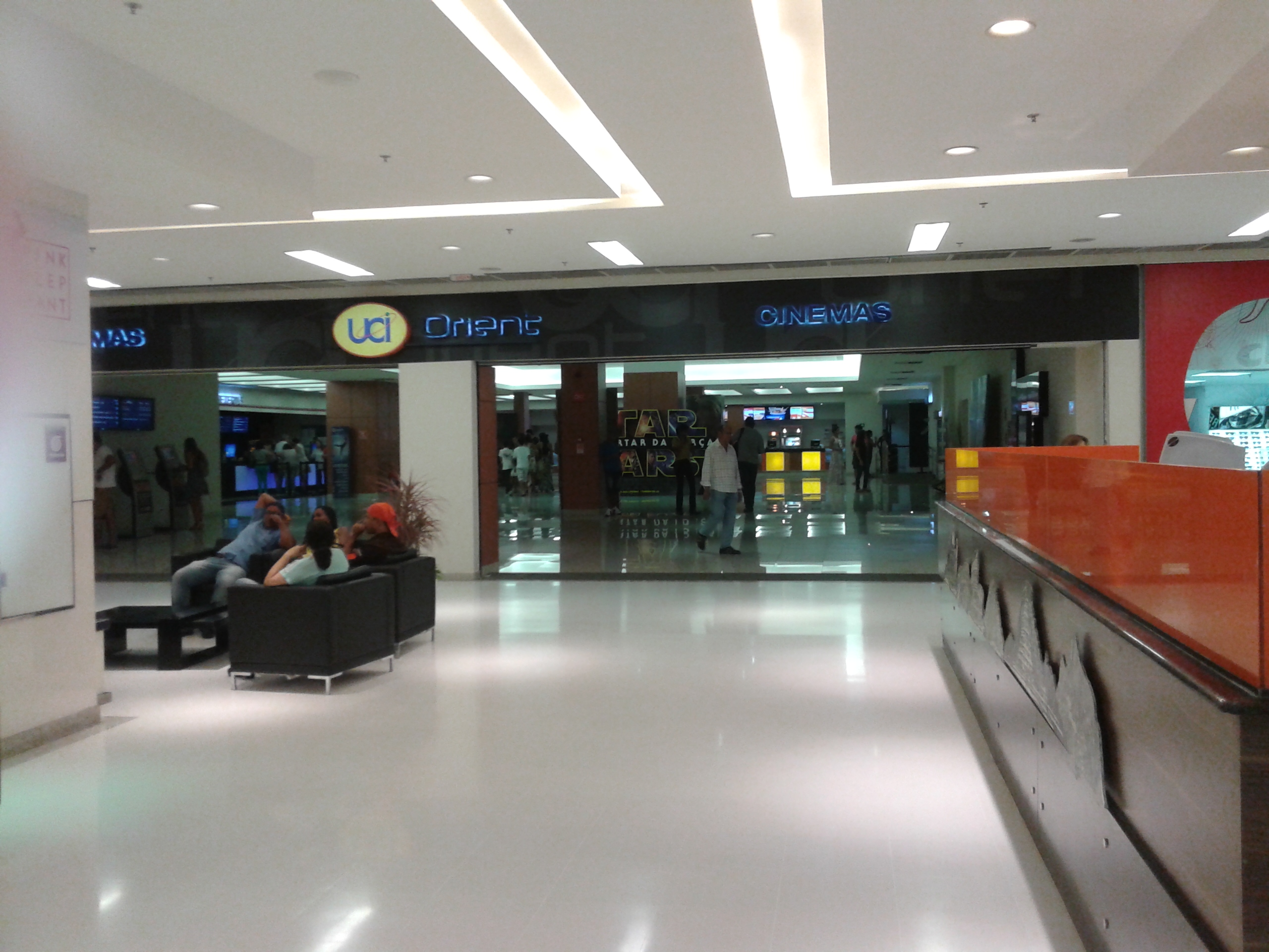 Vista do Foyer do UCI Orient localizado no Shopping Barra